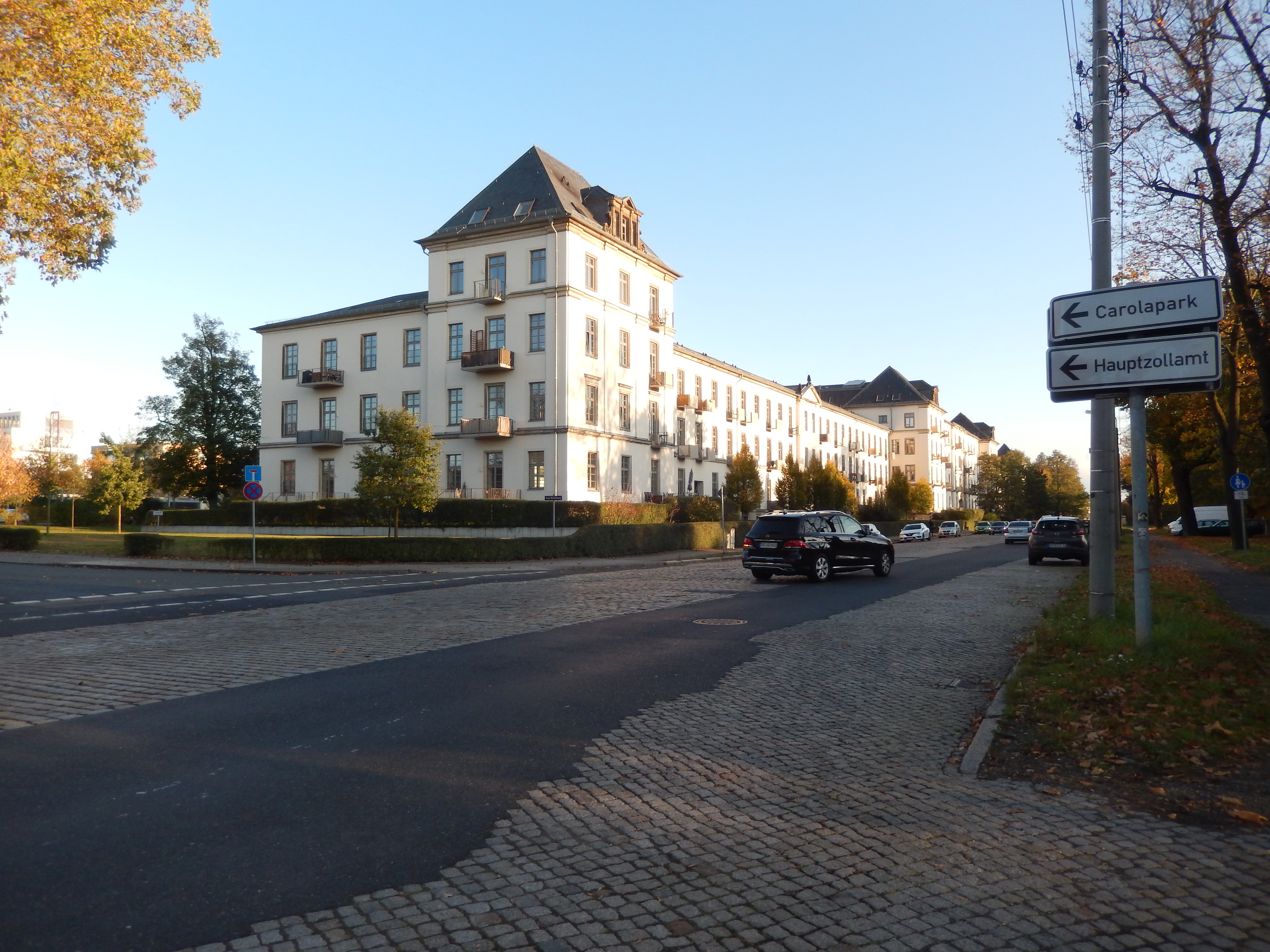 Stauffenbergallee in Dresden, stadtauswärts gesehen links von der Königsbrücker Straße. Stauffenbergstraße Häuser 16. Bereitschaftspolizei